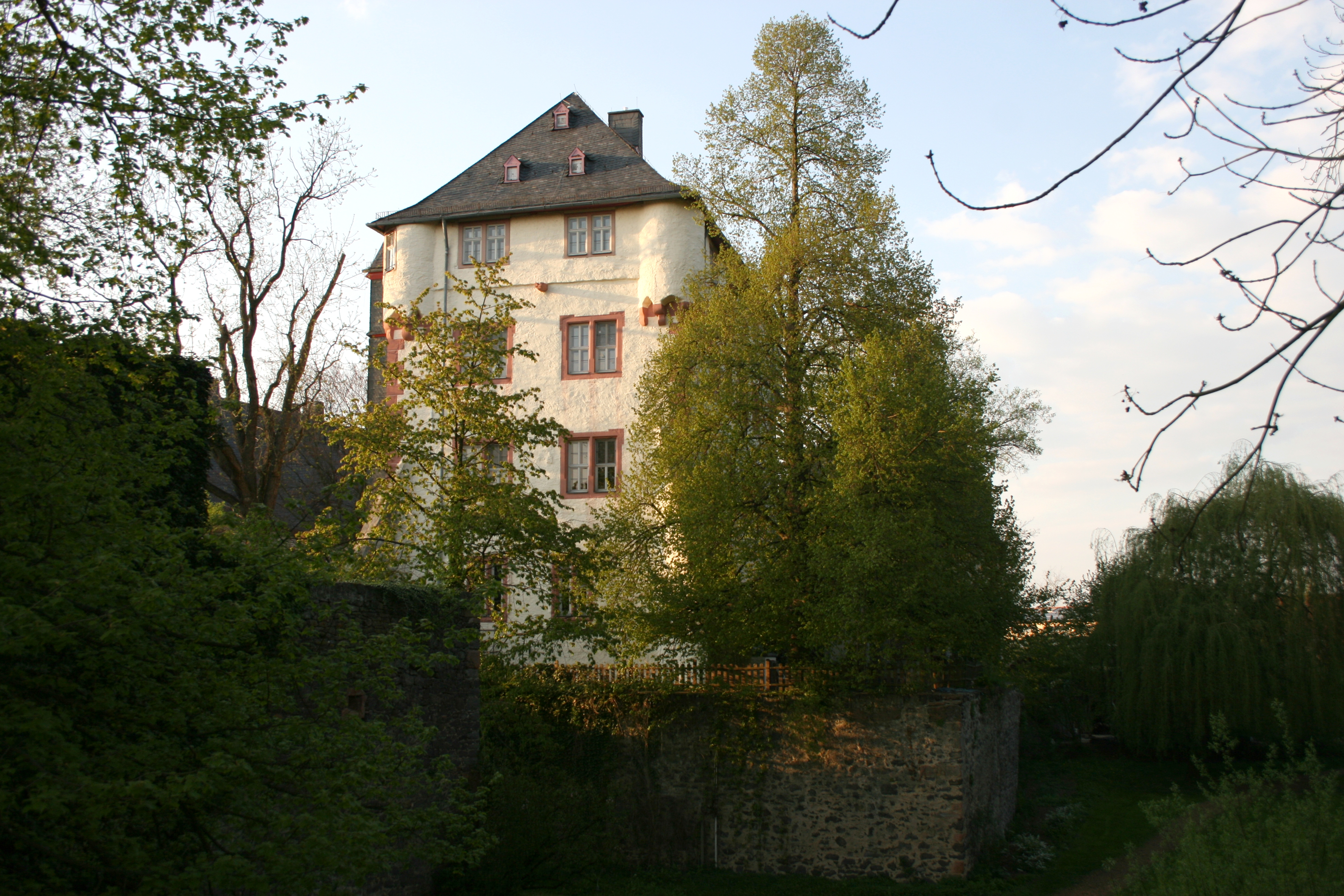 Schloss Bingenheim, Echzell, Wetteraukreis, Hessen, Detail des Wohnturm (Hoher Bau).